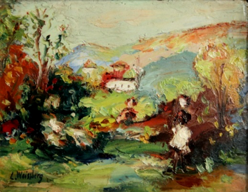 Tableau Entraygues, Paysage à l’arbre jaune, de Léon Weissberg